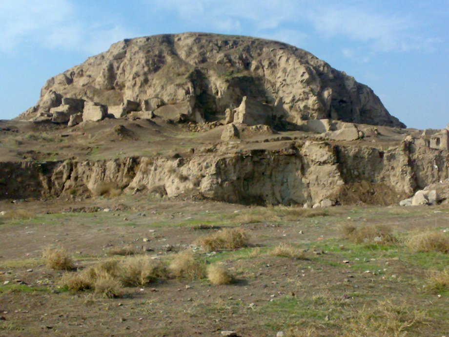 تپه بزک کندر